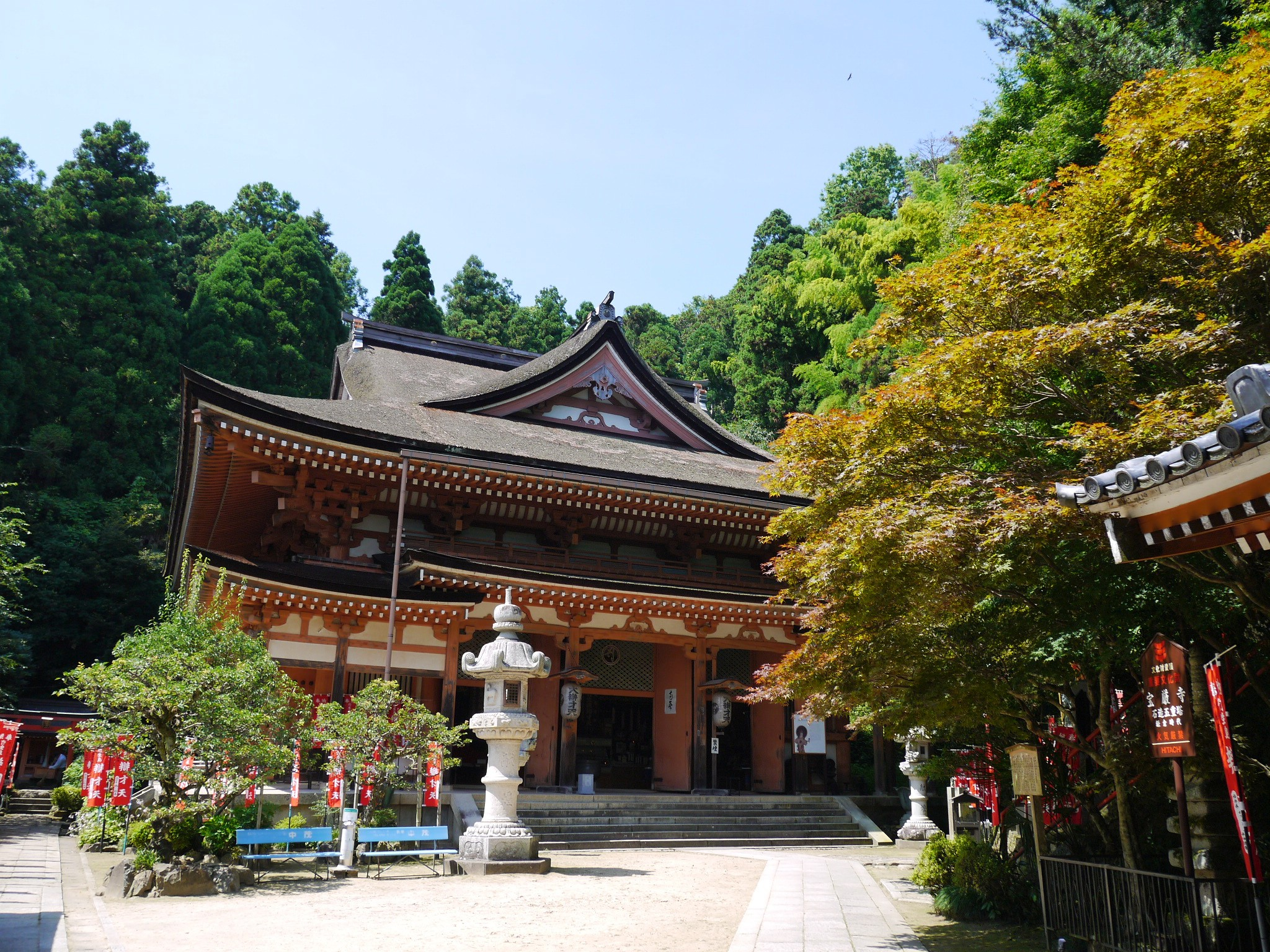 Hogonji 宝厳寺 Temple on Chikubushima